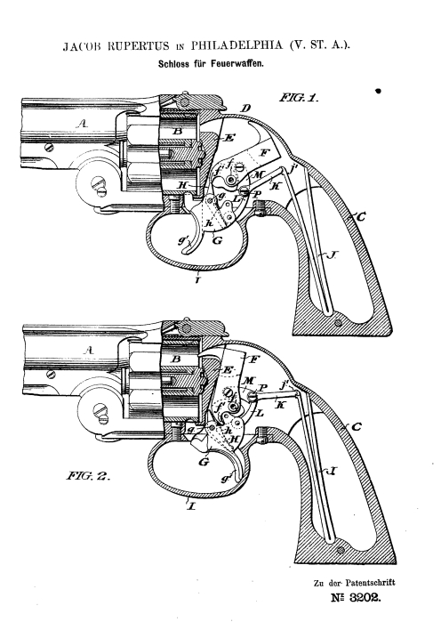 Rupertus Jacob Patent: AT 3202, Page 4, "Schloss fuer Feuerwaffen"